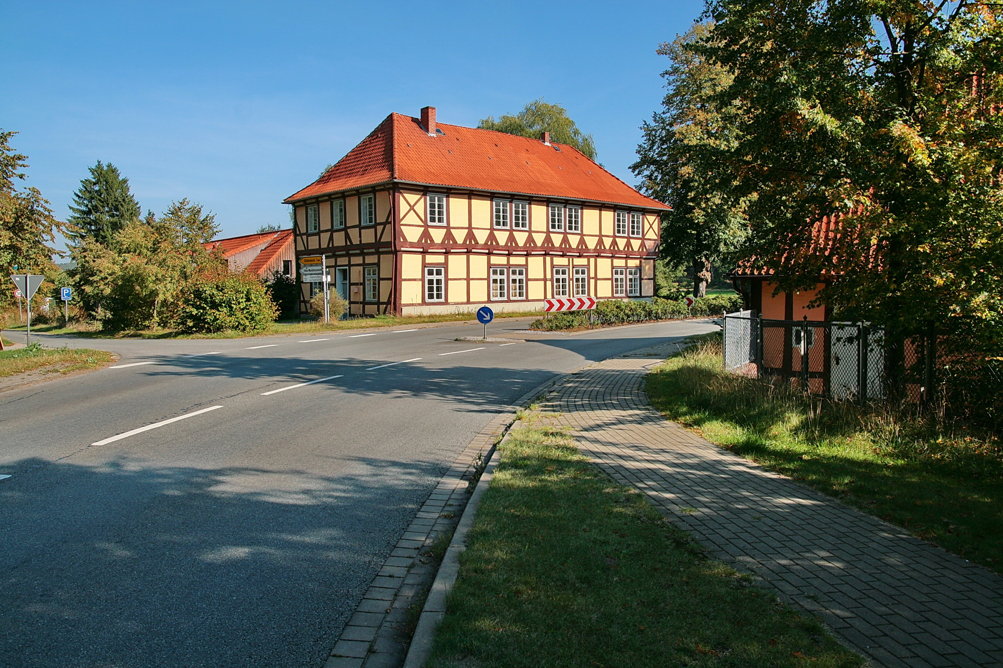 Ortsbild Göhrde (hier zu sehen: das Jagdhaus), Niedersachsen, Deutschland